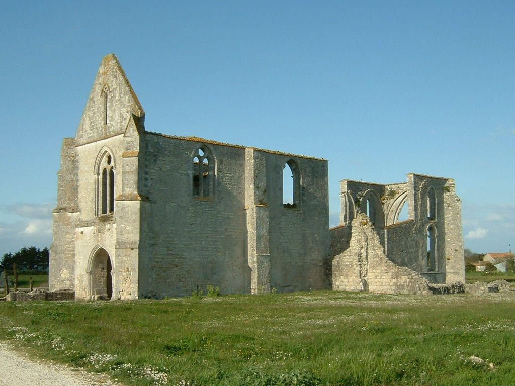 Abbaye Notre Dame de Ré dite des Châteliers : vue d'ensemble du sud (La Flotte, Ile de Ré, Charente Maritime, France)